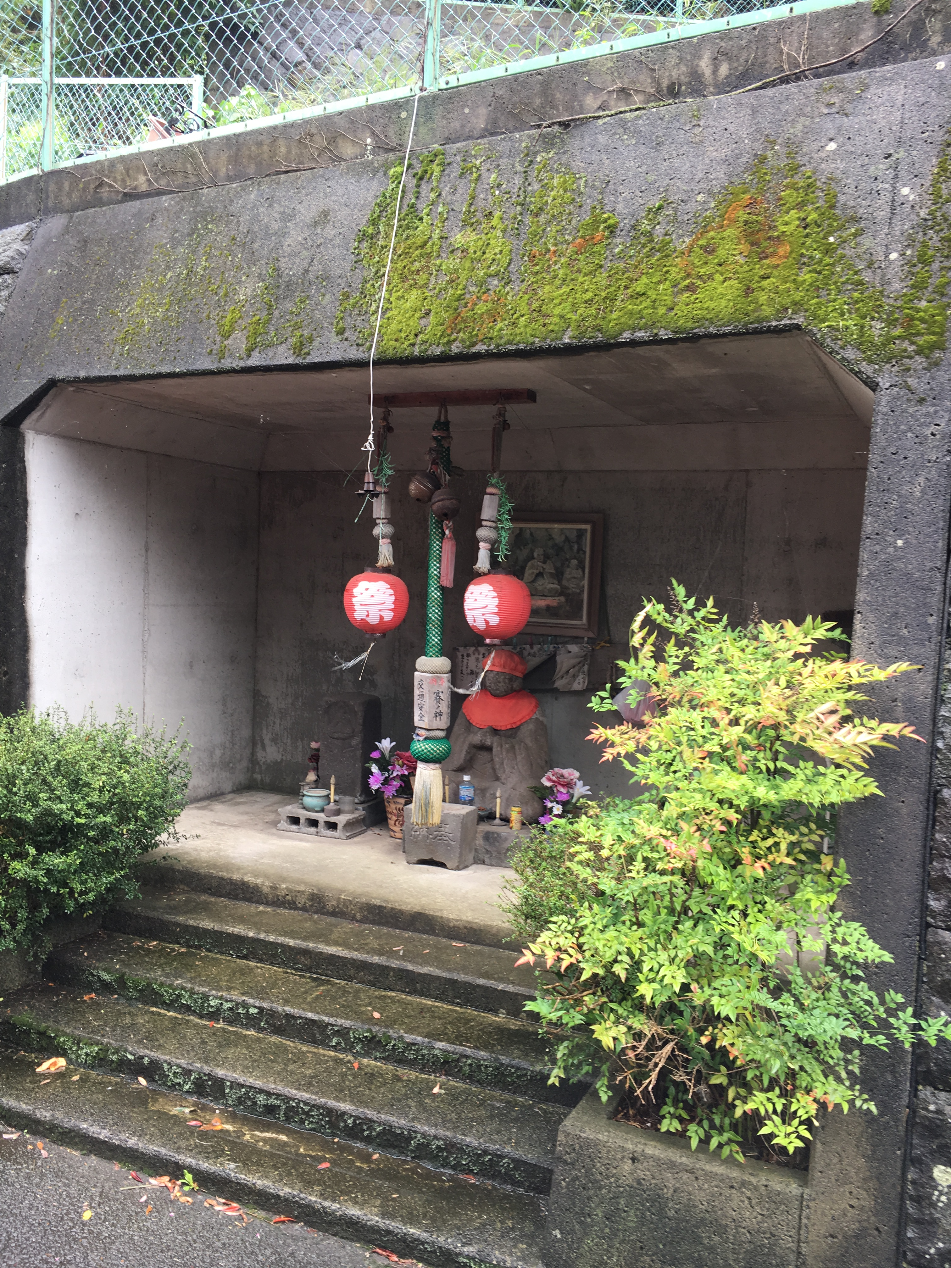 児童館前道祖神